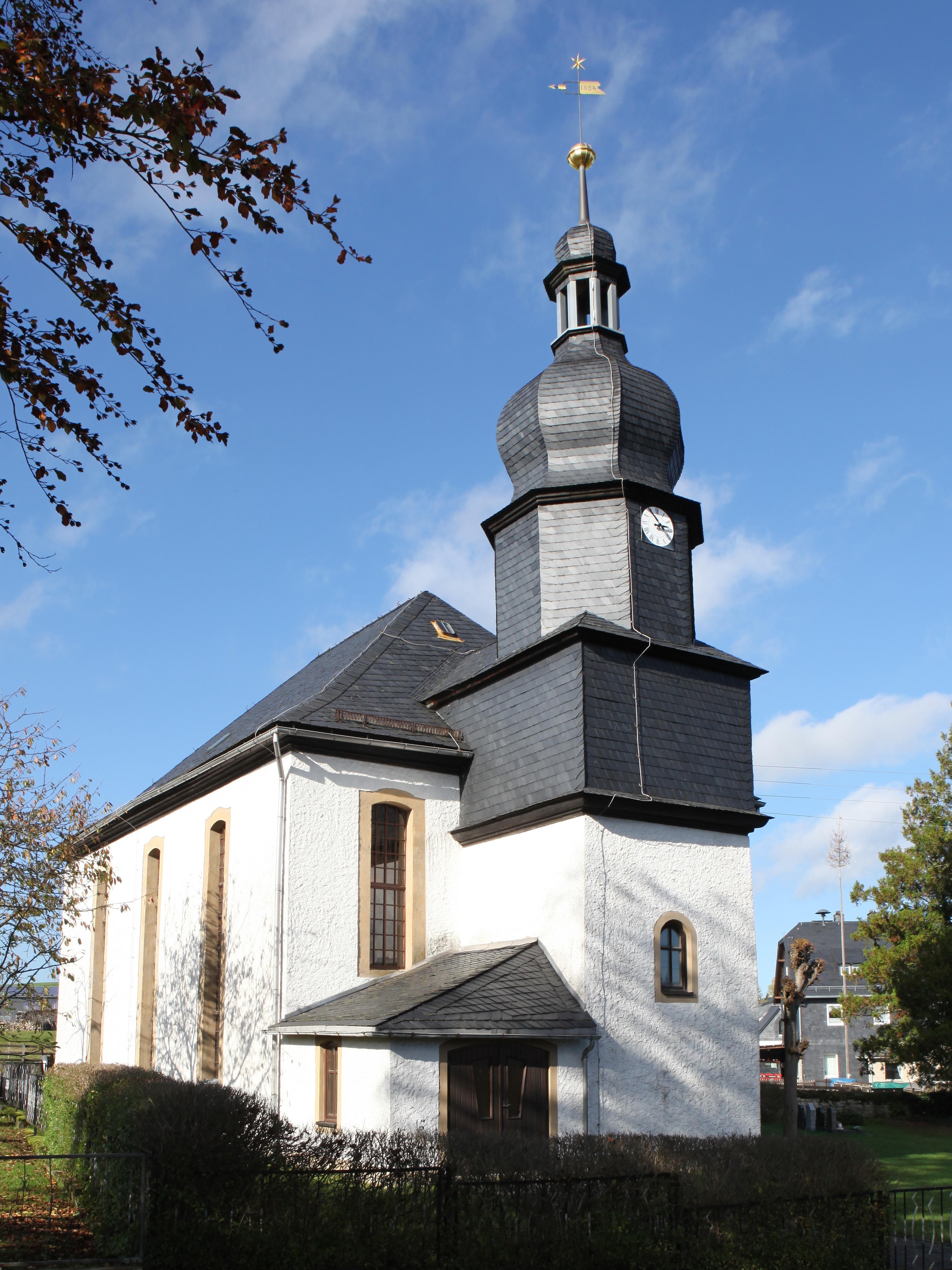 Dreifaltigkeitskirche in Titschendorf, 1778 erbaut, mit denkmalgeschütztem Taufbecken